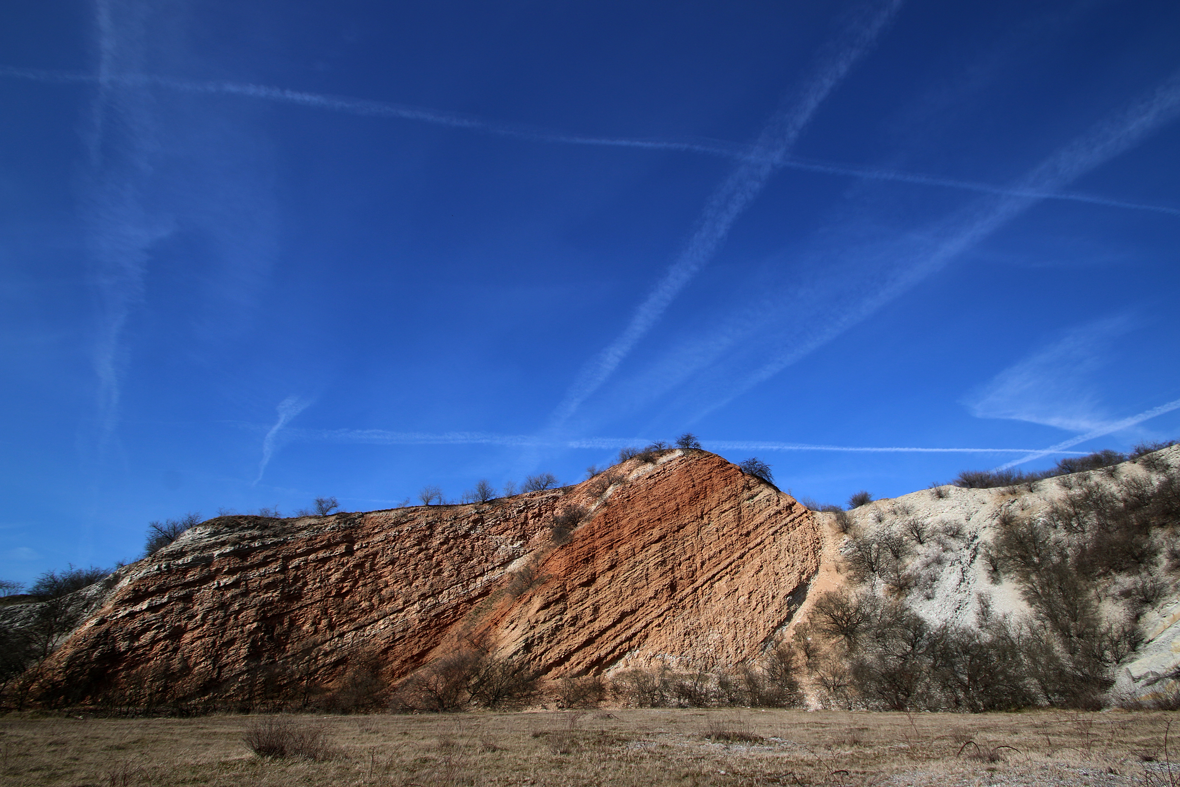 Blick in den ehemaligen Steinbruch bei Hoppenstedt / Osterwieck